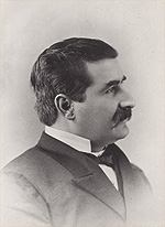 Honoré Mercier, premier of Québec 1887-1891